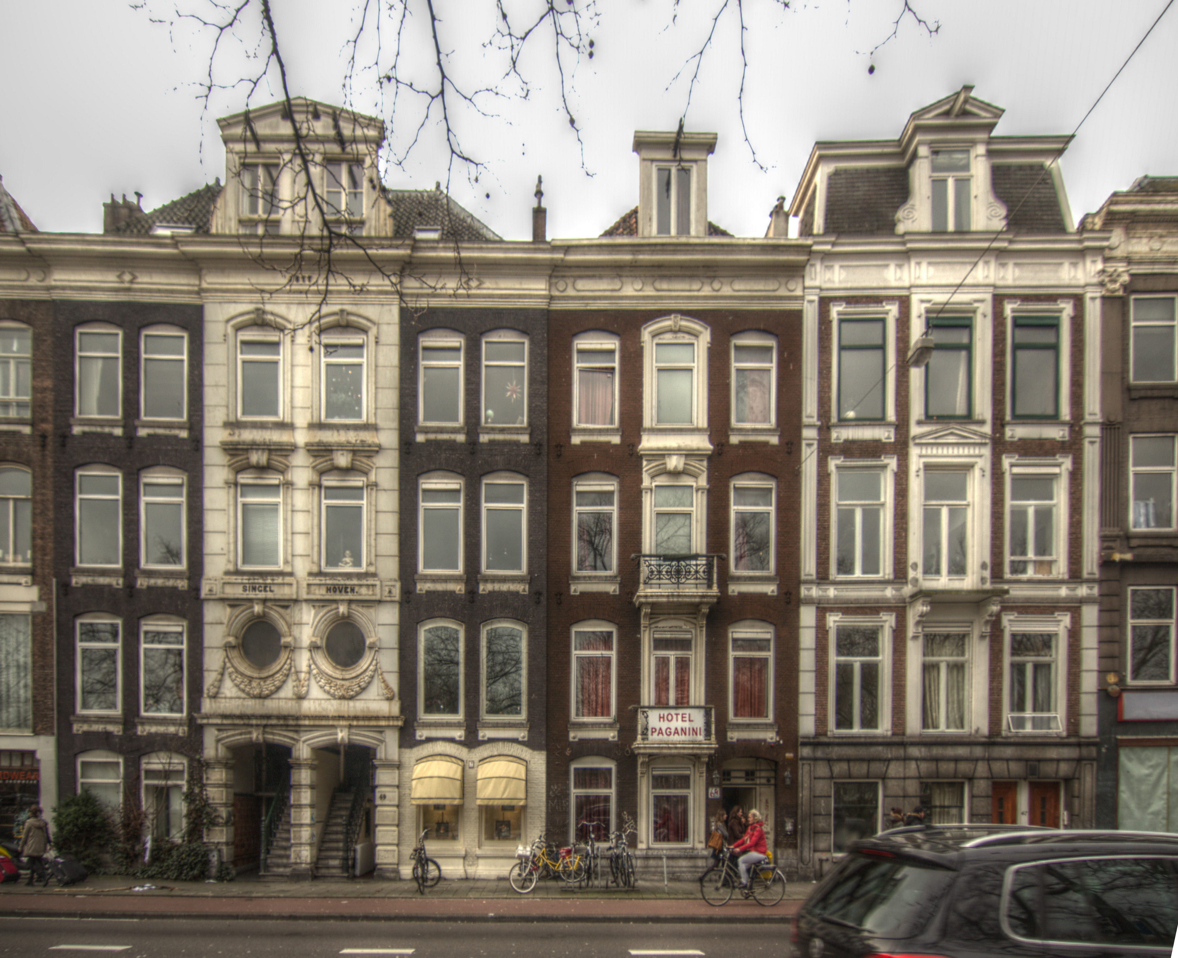 Het gebouw Singelhoven en omliggende panden aan de Stadhouderskade in Amsterdam